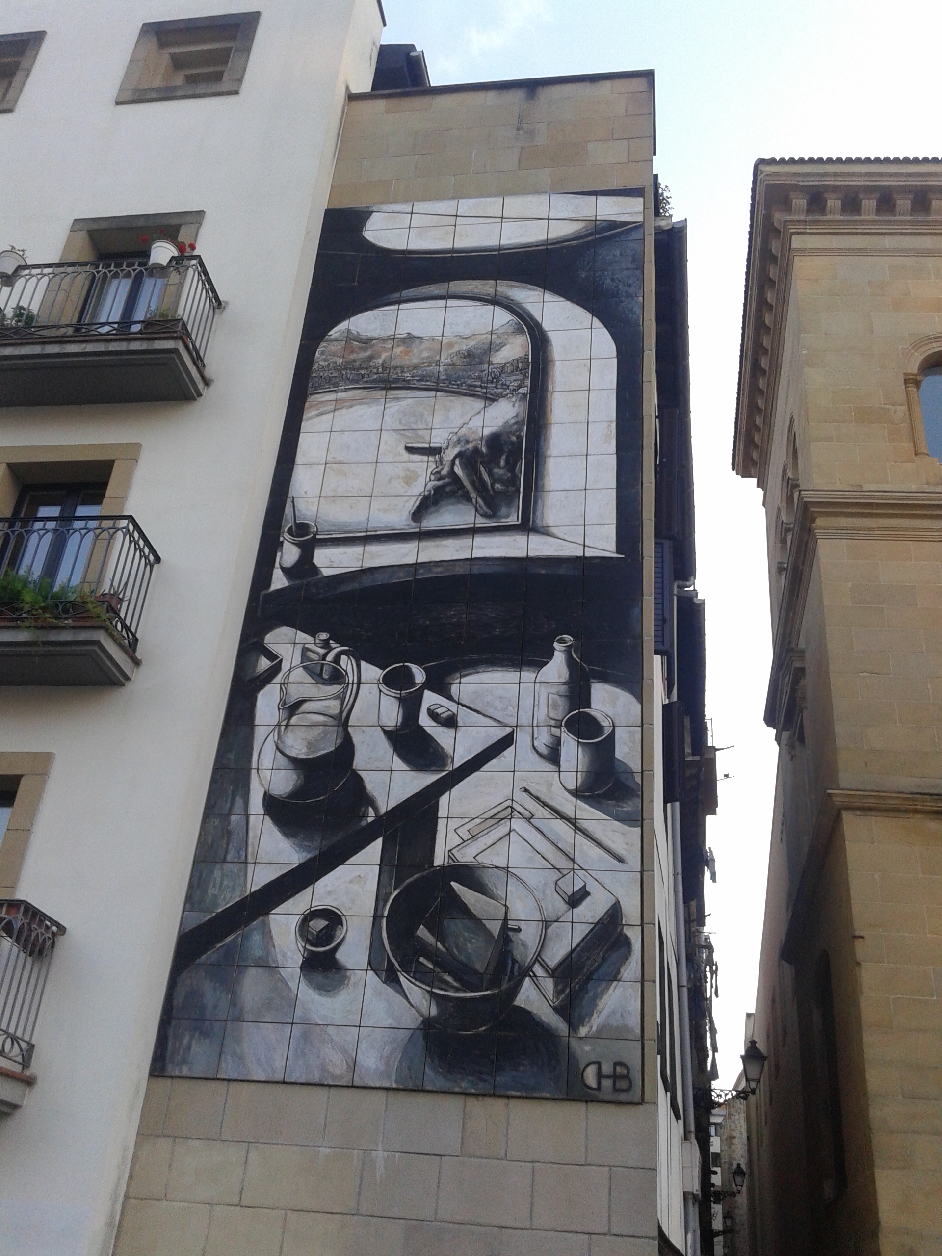 Santa Korda kalea Donostiako Alde Zaharraren estuena da. Sarreran Eduardo Chillida Belzunceren "Beste aldean" murala ikus daiteke.